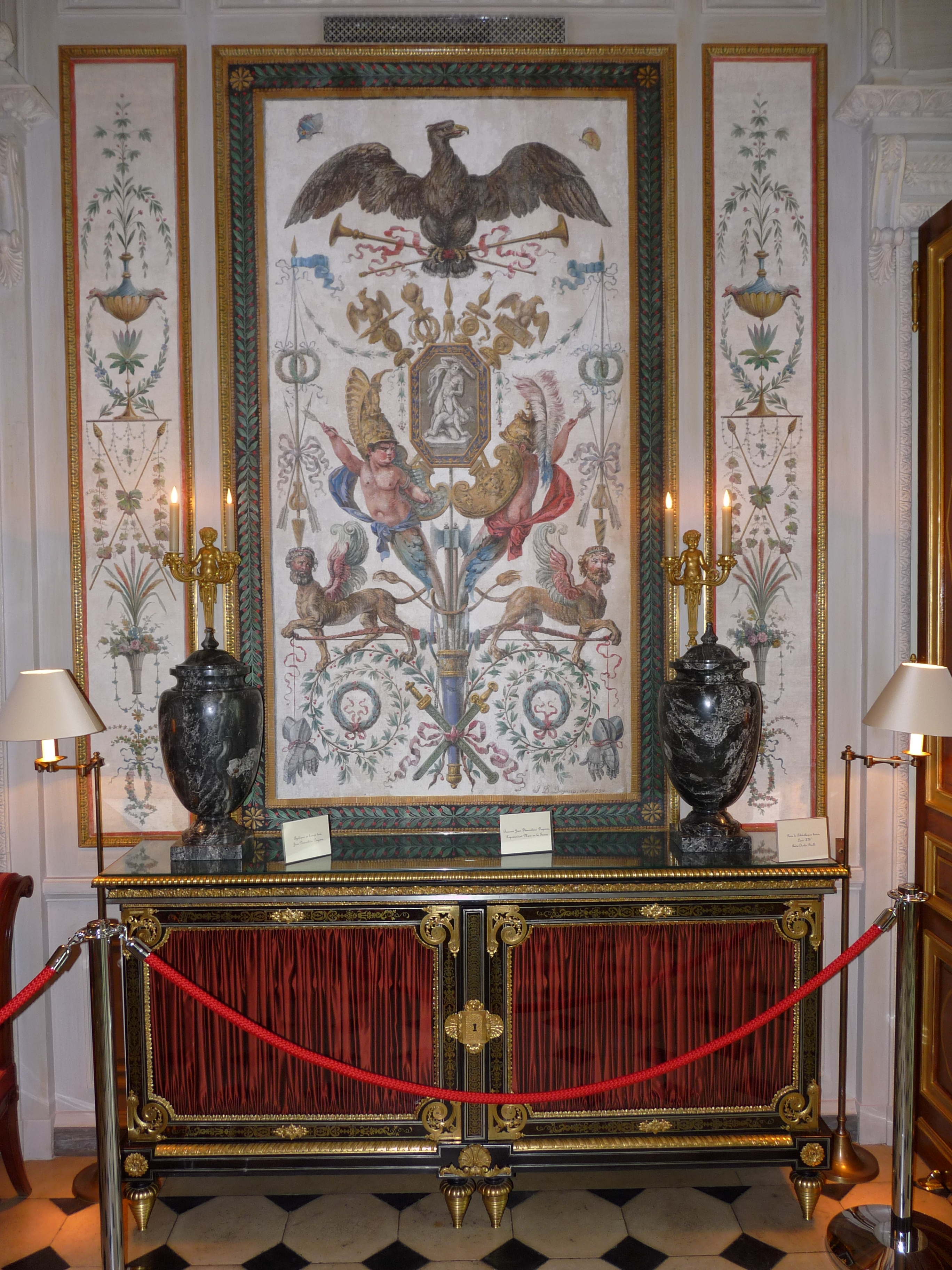 L'hôtel de La Vaupalière à Paris, l'antichambre Dugourc